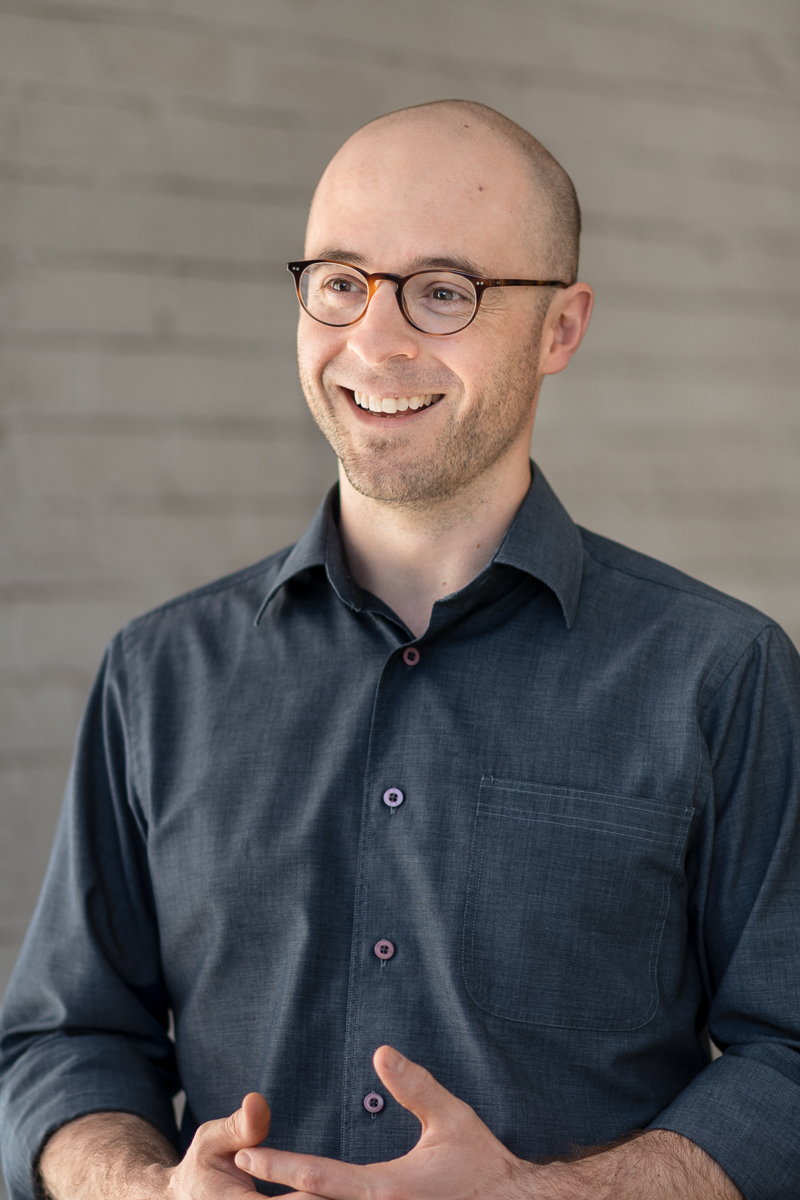 Photo de Sol Zanetti